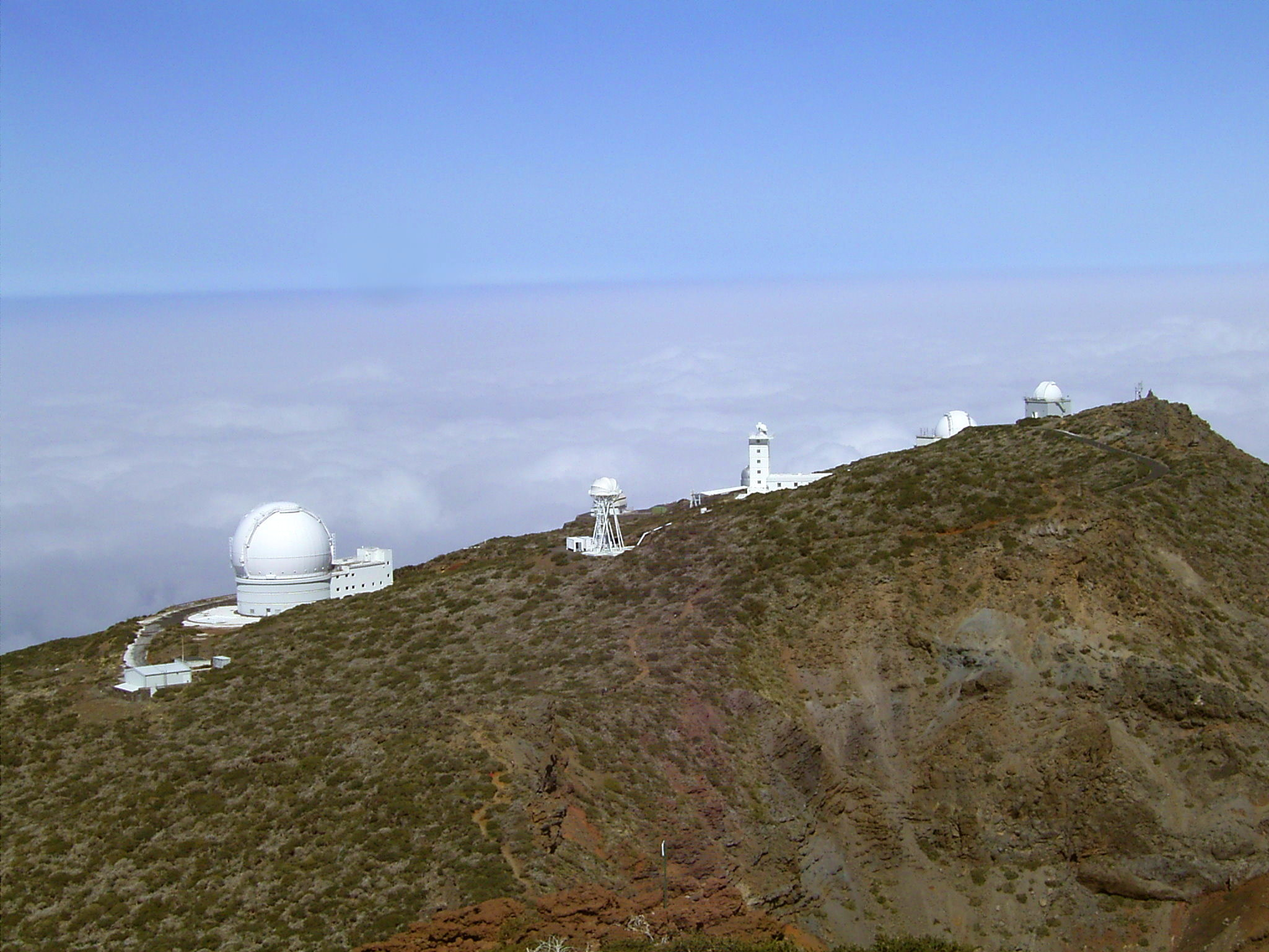 Roque de los Muchachos observatory, La Palma, Canary Islands